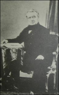 Étienne de Sauvage, ministre de l'Intérieur belge